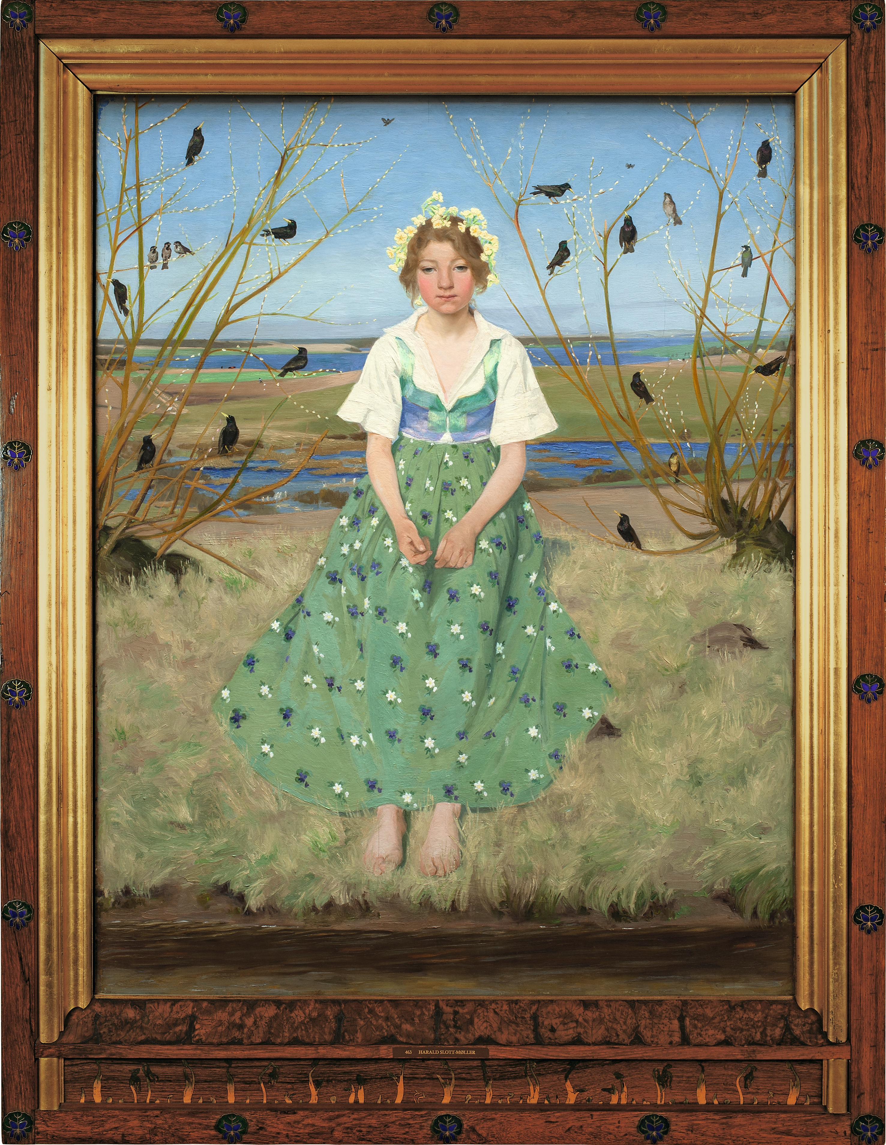 oil on panelmedium QS:P186,Q296955;P186,Q1348059,P518,Q861259